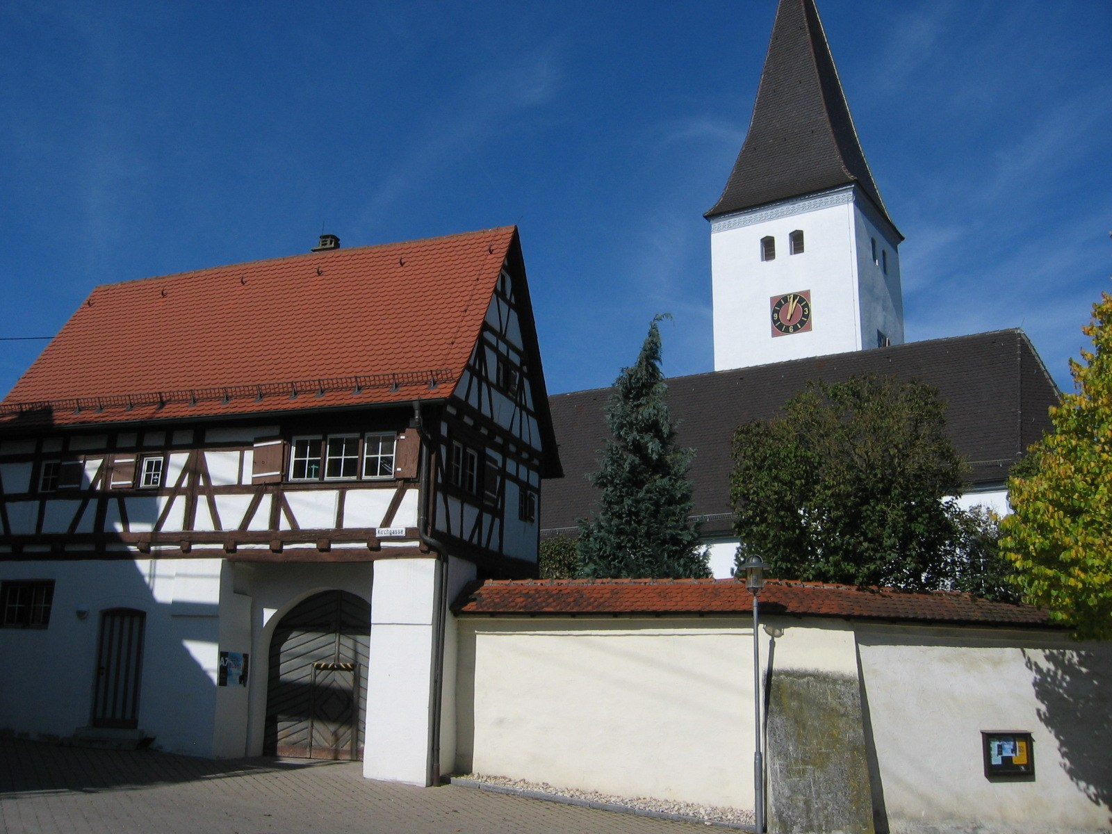 Göttingen, Stadt Langenau, Alb-Donau-Kreis: Evangelische Kirche